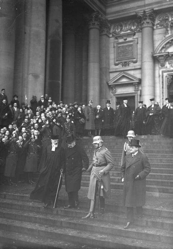 Festgottesdienst anlässlich der Reichsgründungsfeier im Berliner Dom! Reichspräsident von Hindenburg verlässt unter Begleitung seines Sohnes Oberstleutnant von Hindenburg sowie der Geistlichkeit den Dom. Ganz rechts Staatssekretär Dr. Meissner.